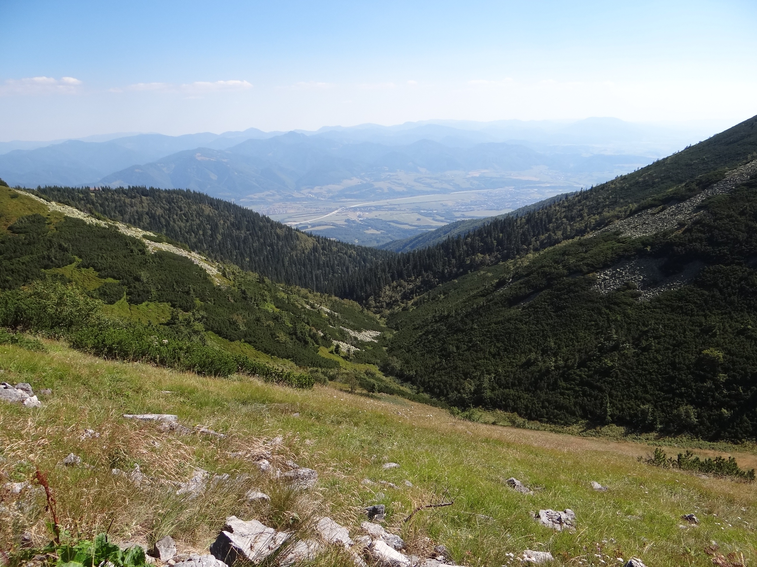 Snilovska dolina